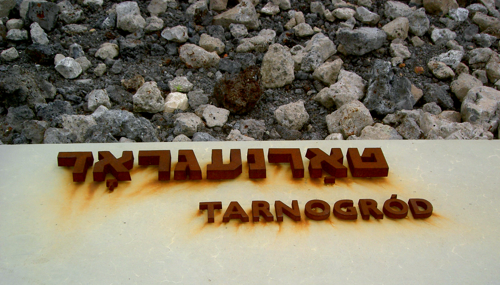 Napis "Tarnogród" w Obozie Zagłady w Bełżcu (muzeum); sign "Tarnogród" in Belzec Concentration Camp (museum)